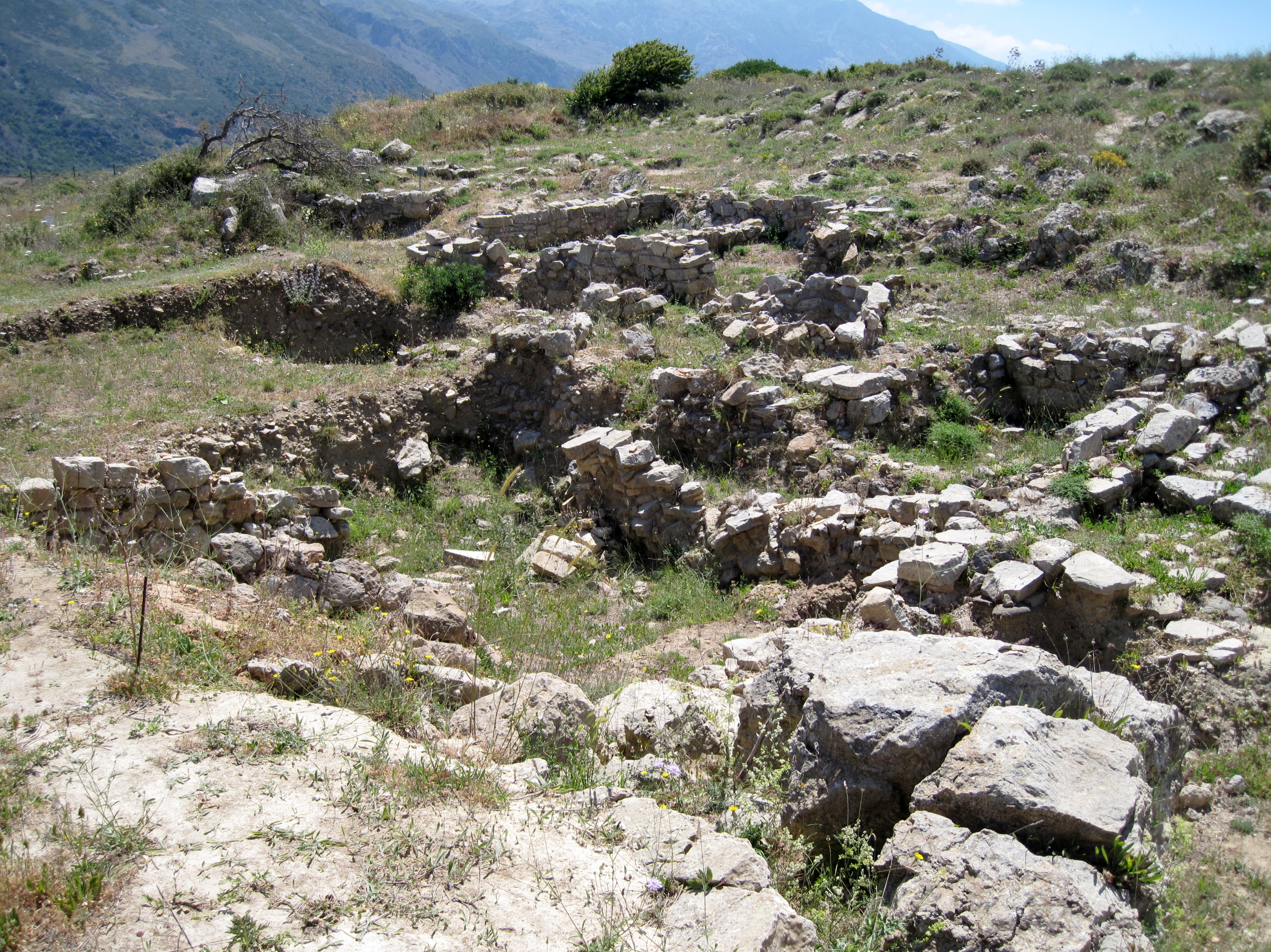 Ausgrabungsstätte der Akropolis der antiken Stadt Sybrita auf dem Hügel Kefala bei Thronos, Gemeinde Syvritos, Präfektur Rethymno, Kreta, Griechenland